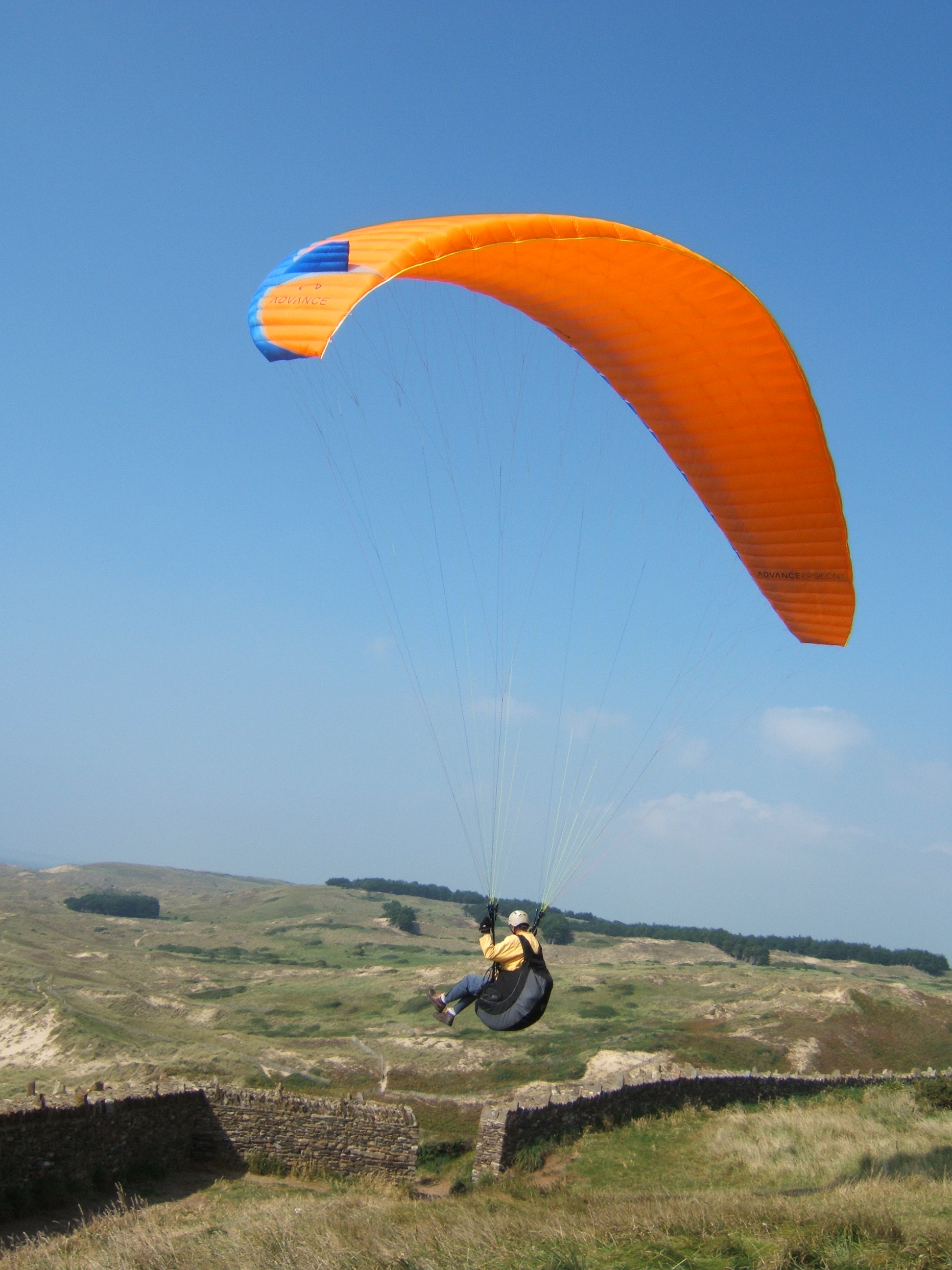 Un parapentiste décolle du Cap Carteret dans le Cotentin. Parapente: Advance Epsilon 5